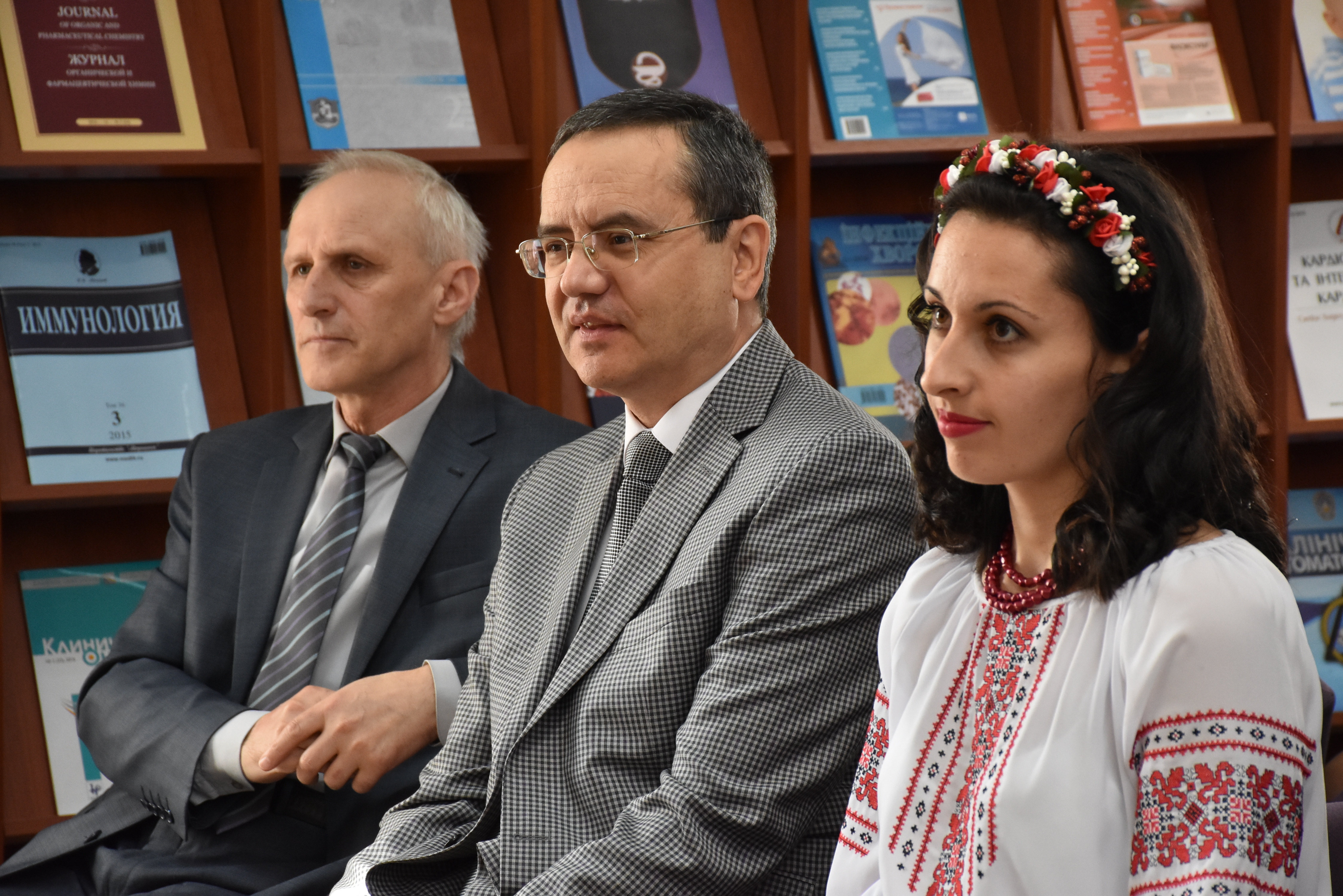 «День бібліотеки» в бібліотеці Тернопільського державного медичного університету імені І. Я. Горбачевського. Проректор Іван Кліщ та ректор Михайло Корда.